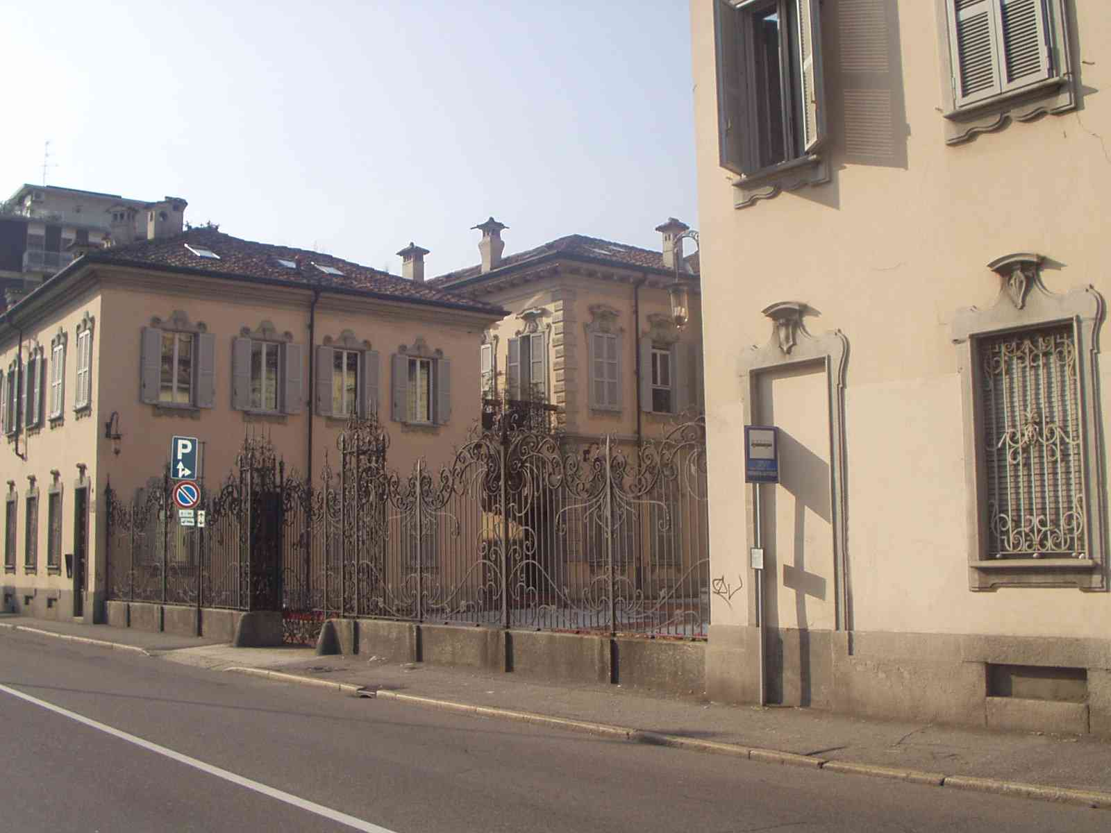 Monza Villa Sala in via Lecco